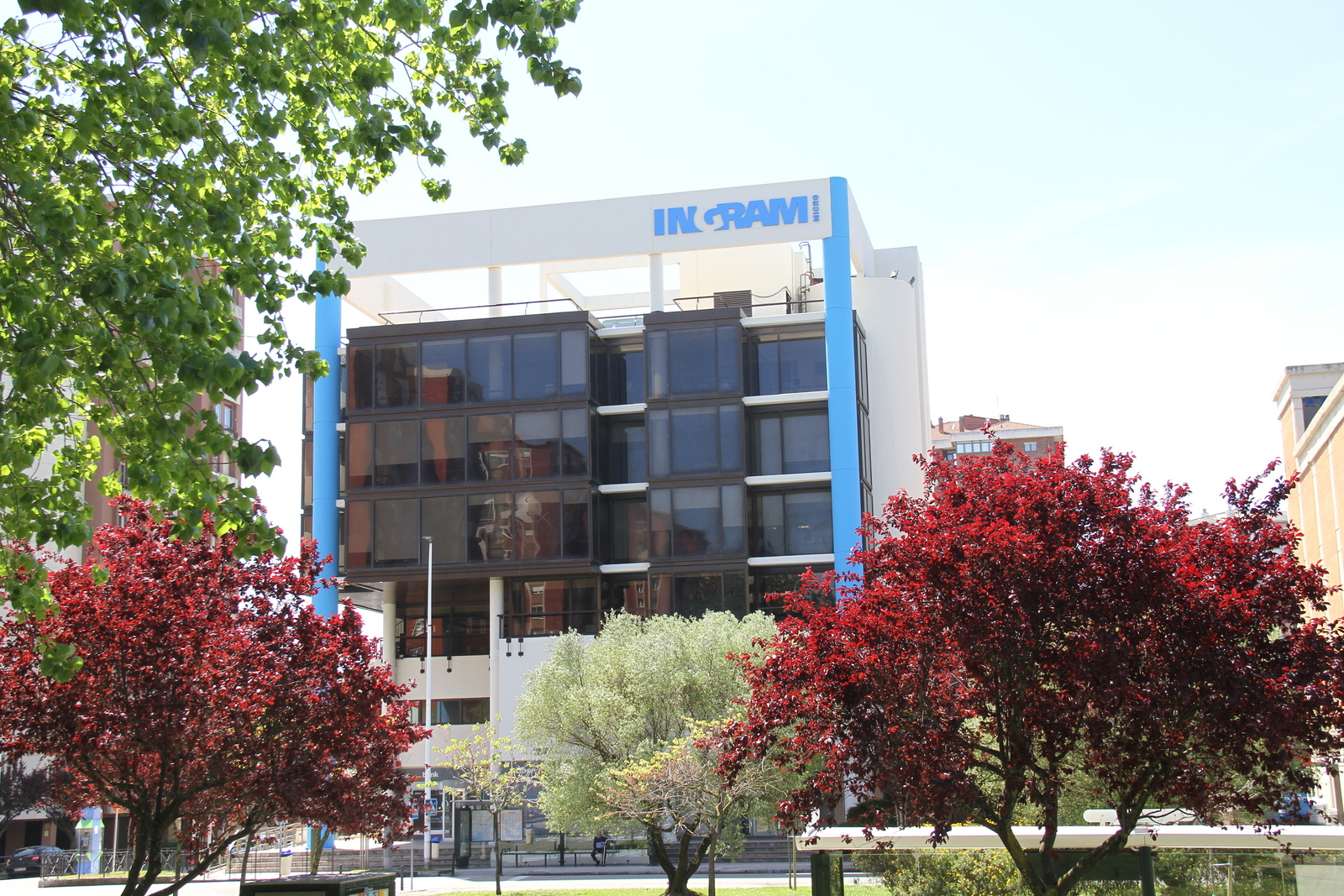 Sede central de Ingram Micro Cloud, ubicada en la ciudad de Santander (Cantabria)